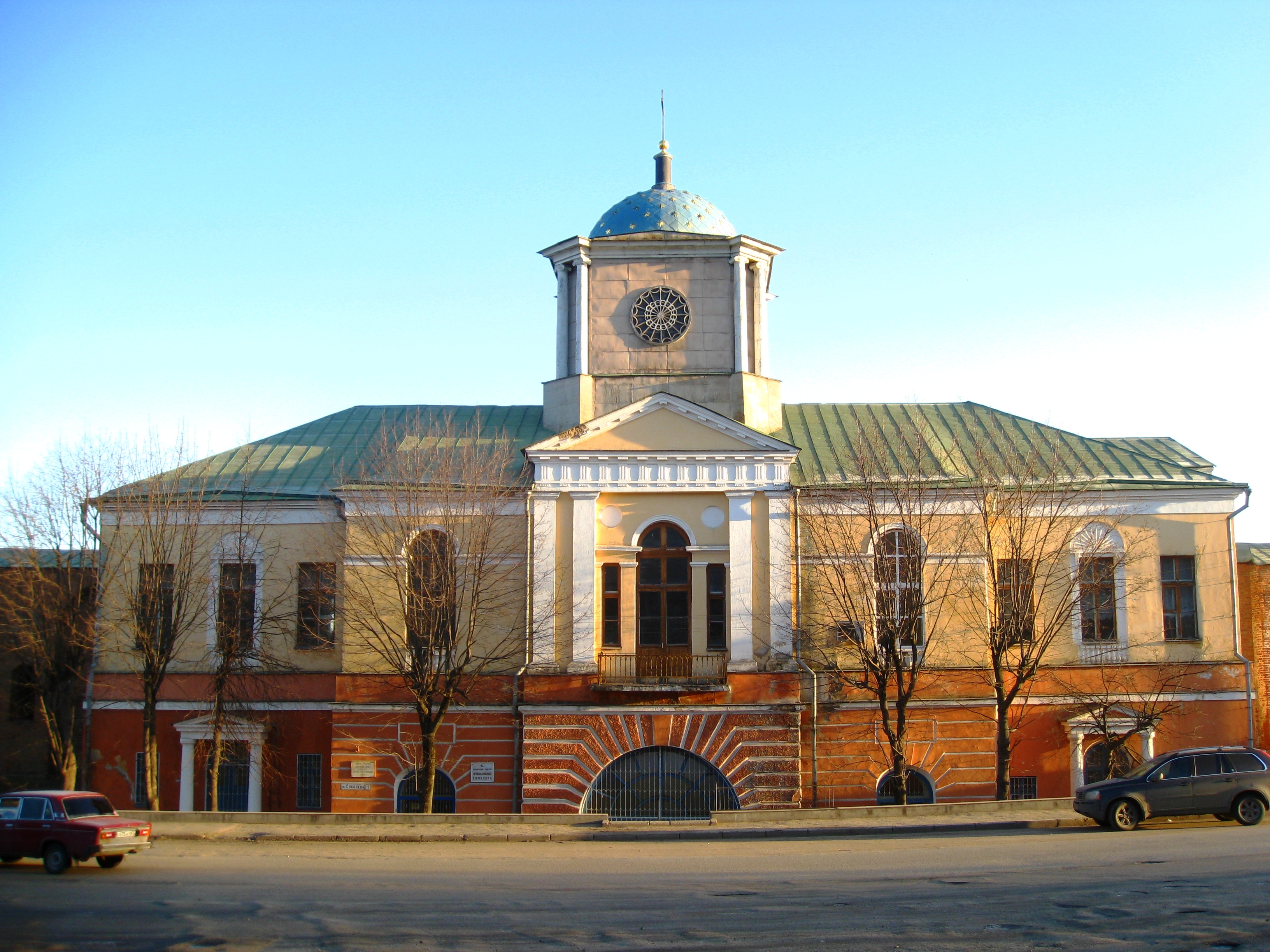 Днепровские ворота - надвратная башня смоленсой крепостной стены (церковь Одигитрии).